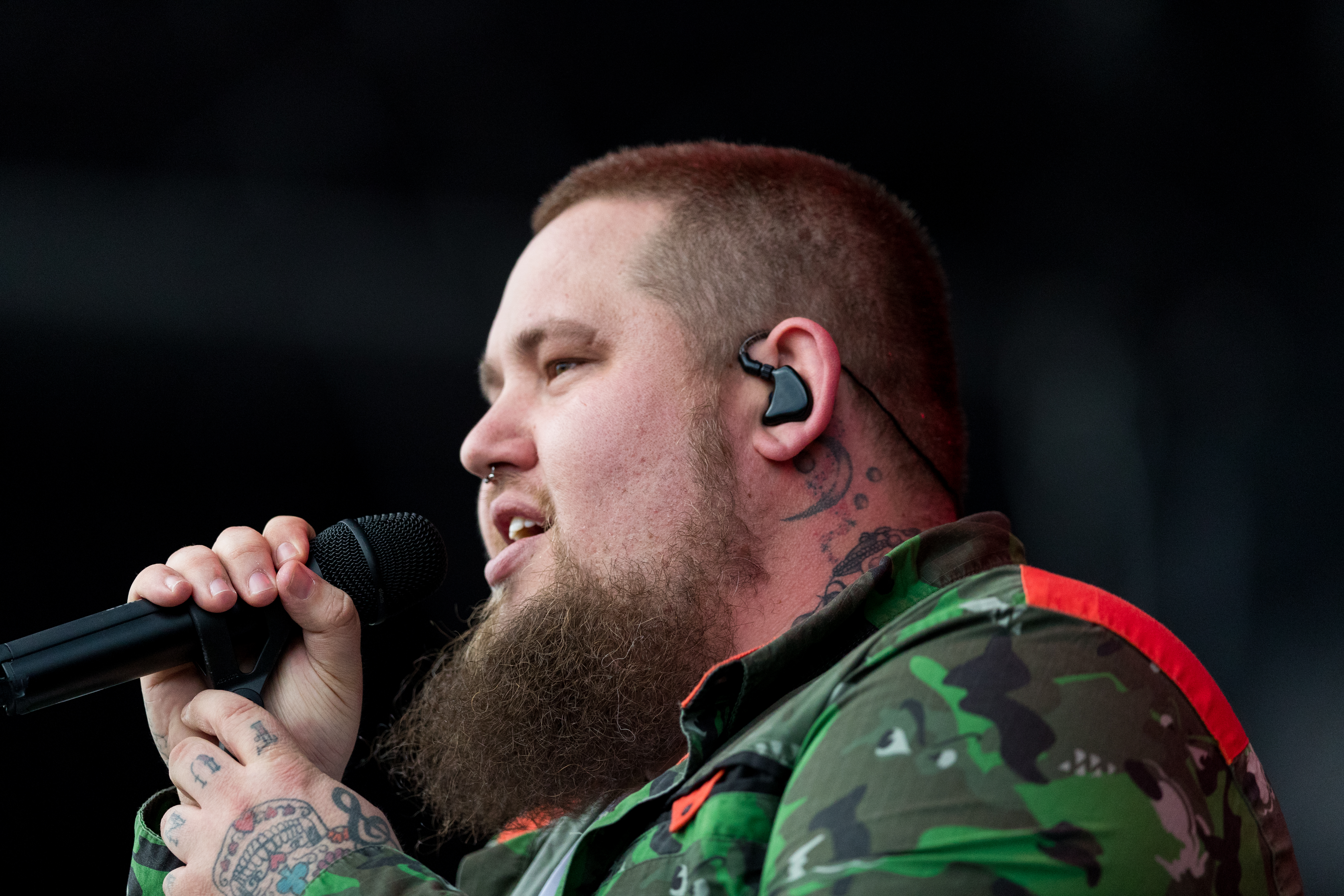 Rag'n'Bone Man during Rock am Ring at Nürburgring, Nürnburg, Rheinland Pfalz, Germany on 2017-06-02, Photo: Sven Mandel